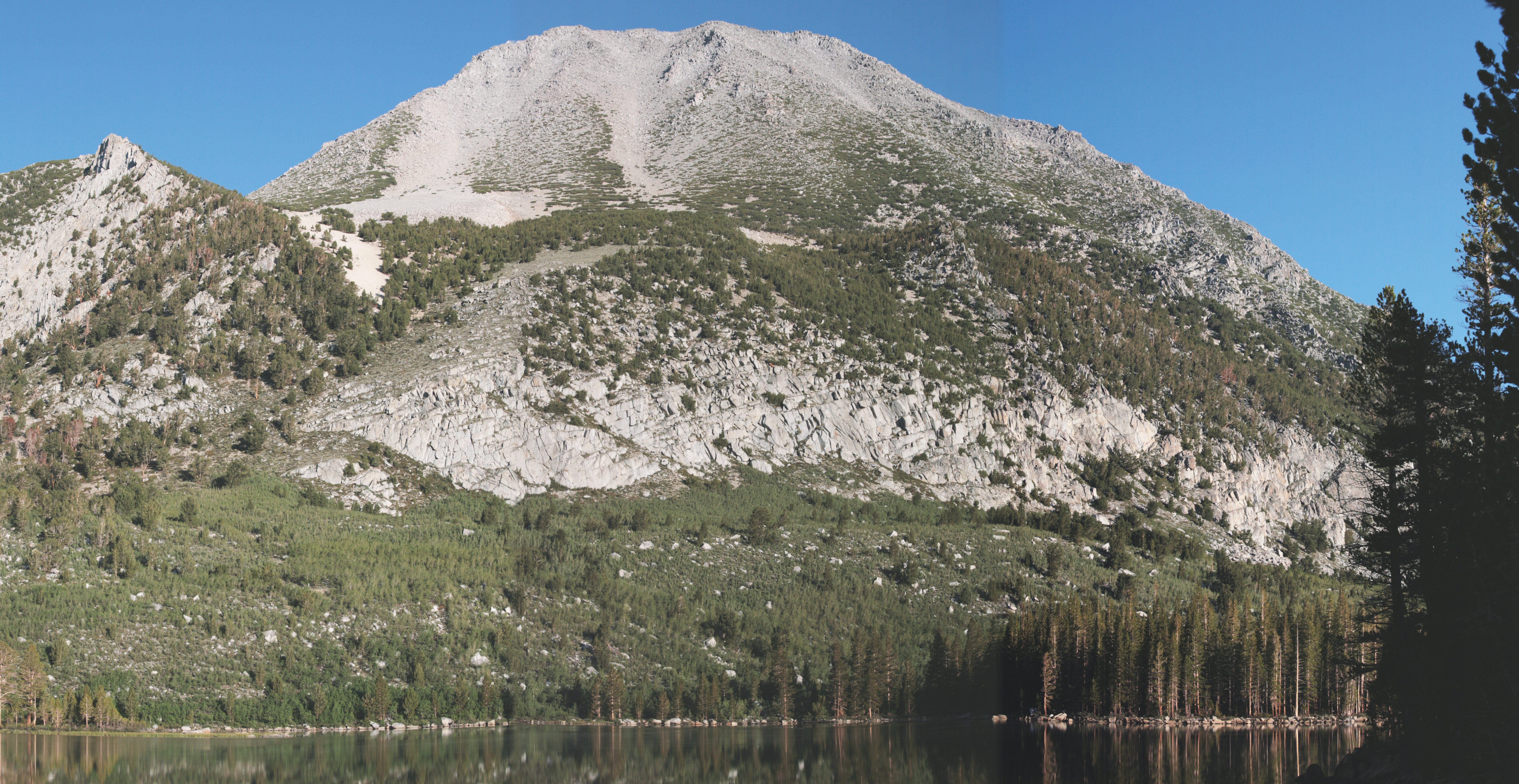 Mount Morgan taken at Davis Lake